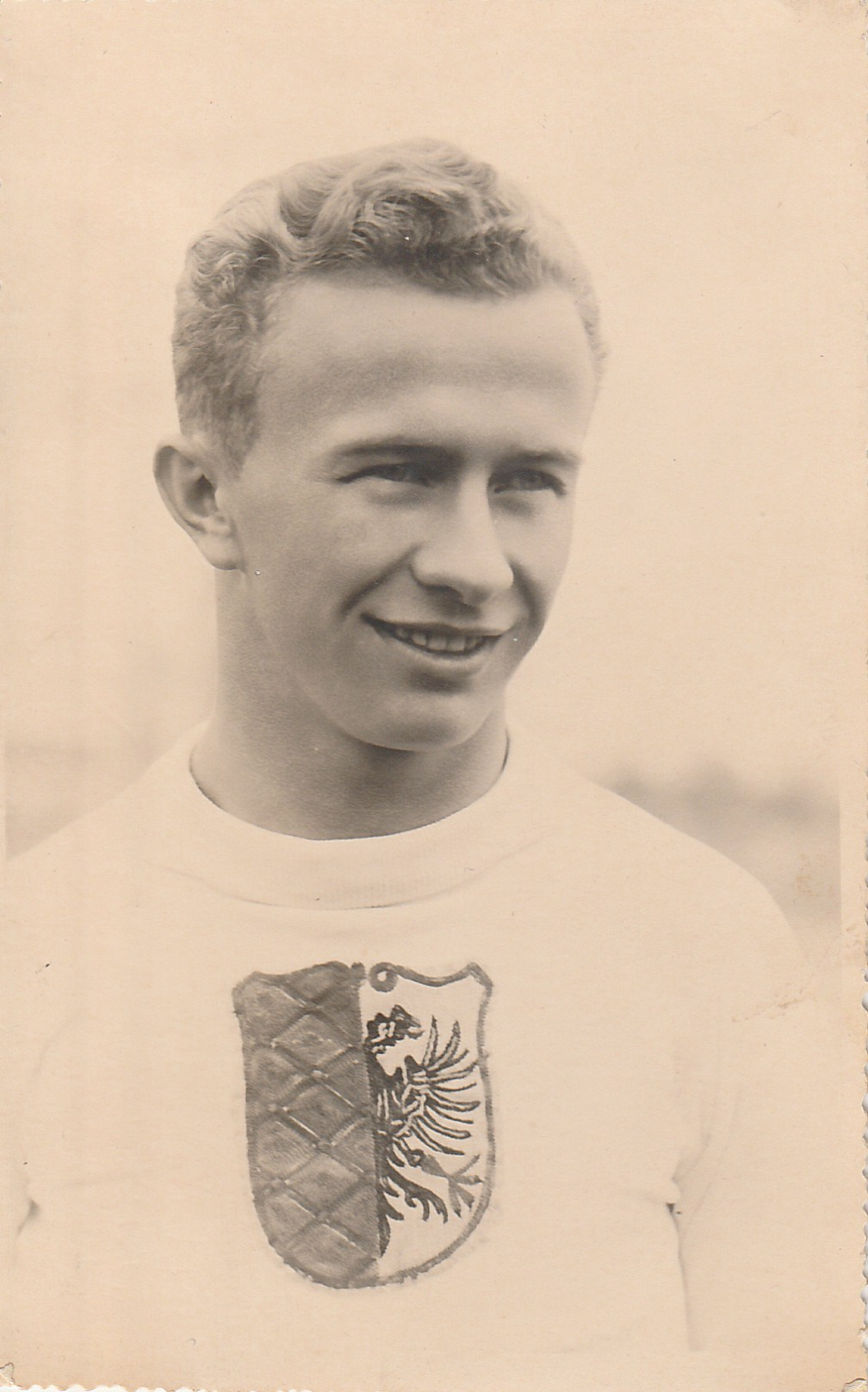 Antonín Dufek, levé křídlo S. K. Prostějov, 1933